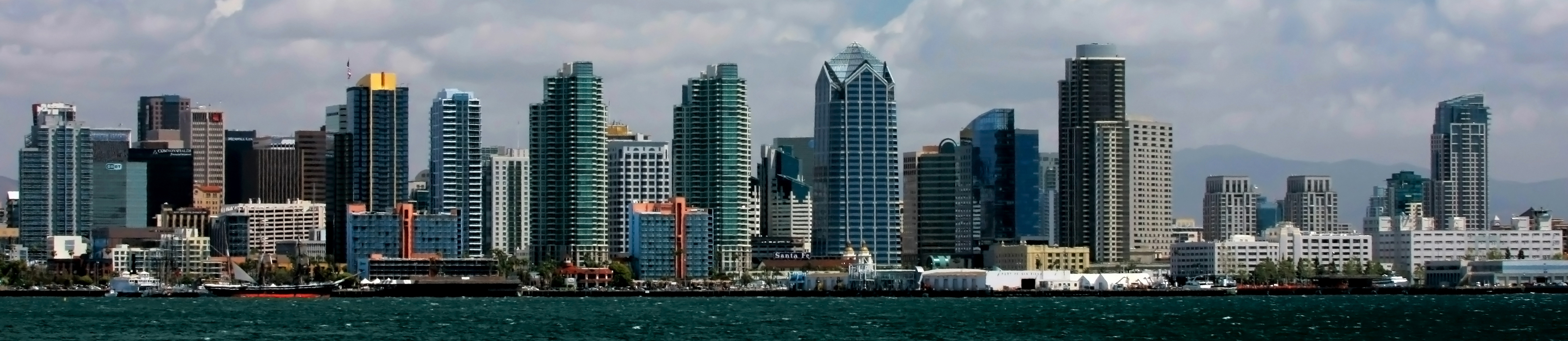 Downtown San Diego skyline